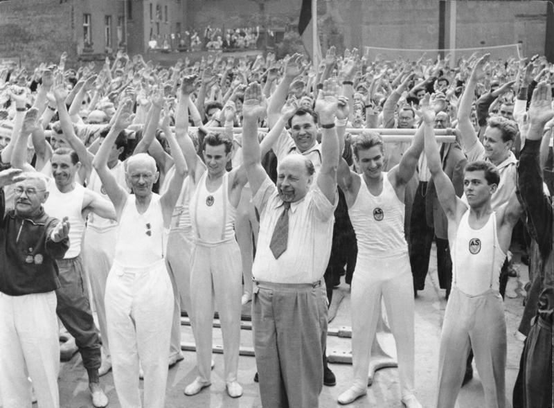 Leipzig, Turn- und Sportfest, Walter Ulbricht Zentralbild/Zastrom 15.8.1959 III. Deutsches Turn- und Sportfest in Leipzig Im Leipziger Wohnbezirk Süd fand ein wahres Fest des Volkssportes statt, als am Sonnabend, dem 15.8.59 die Leipziger Bevölkerung dieses Bezirkes mit Walter Ulbricht und seiner Gattin, dem 1. Sekretär der Bezirksleitung Leipzig der SED, Paul Fröhlich, und dem Präsident des Deutschen Turn- und Sportbundes, Rudi Reichert, am Massensport teilnahmen. UBz.: Erste Reihe dritter von links Walter Ulbricht Abgebildete Personen: Ulbricht, Walter: Staatsratsvorsitzender, Erster Sekretär des Zentralkomitees (ZK) der SED, Vorsitzender des Nationalen Verteidigungsrates, DDR (GND 118625179)